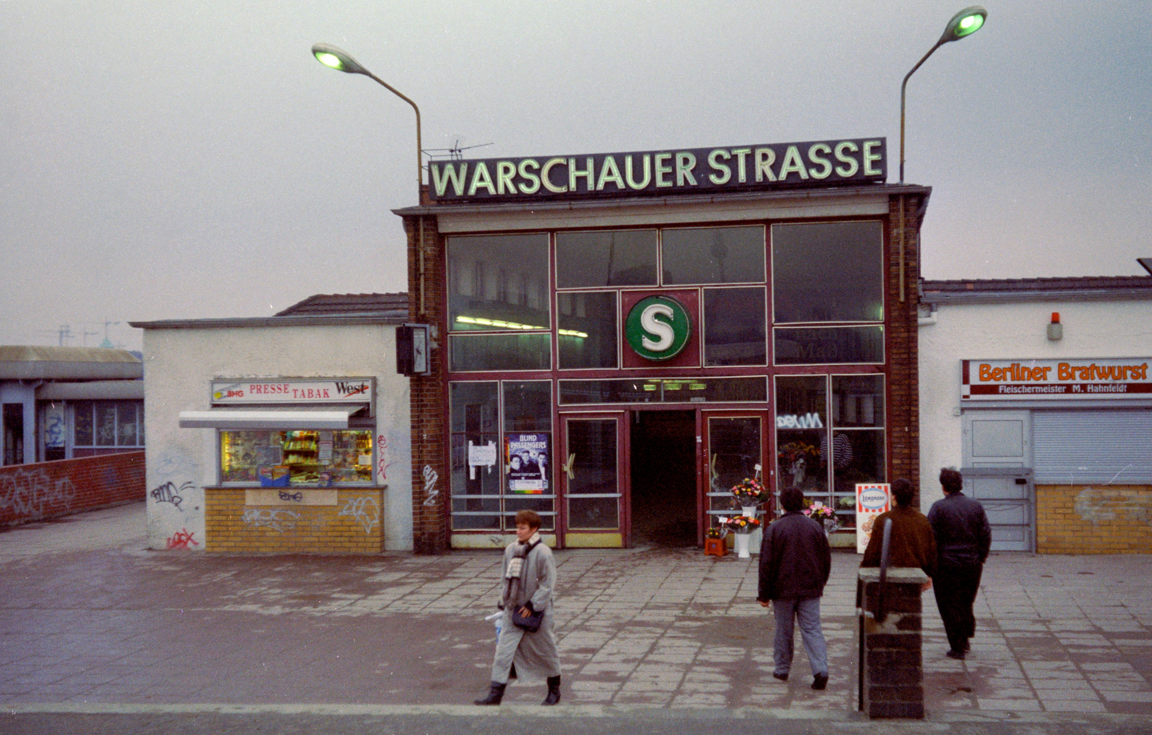 Zugang zum Bahnhof Warschauer Straße in Berlin im Jahre 1994